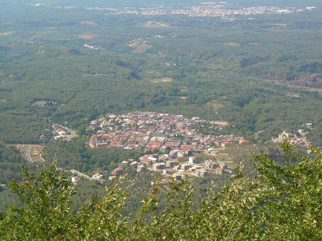 Molochio (RC) vista dal Belvedere in loc. Catorella (Monte Trepitò)